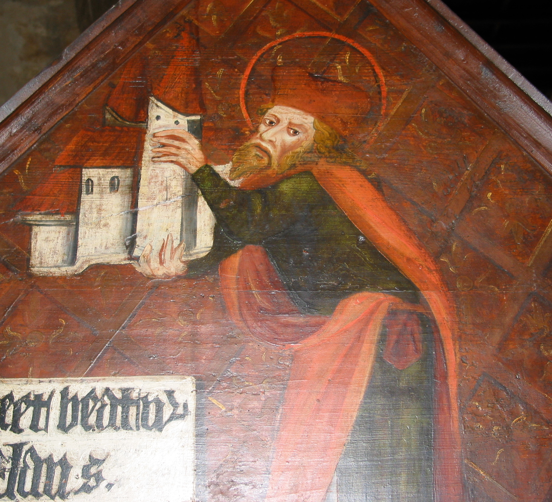 Wratysław I (fragment grobowca)